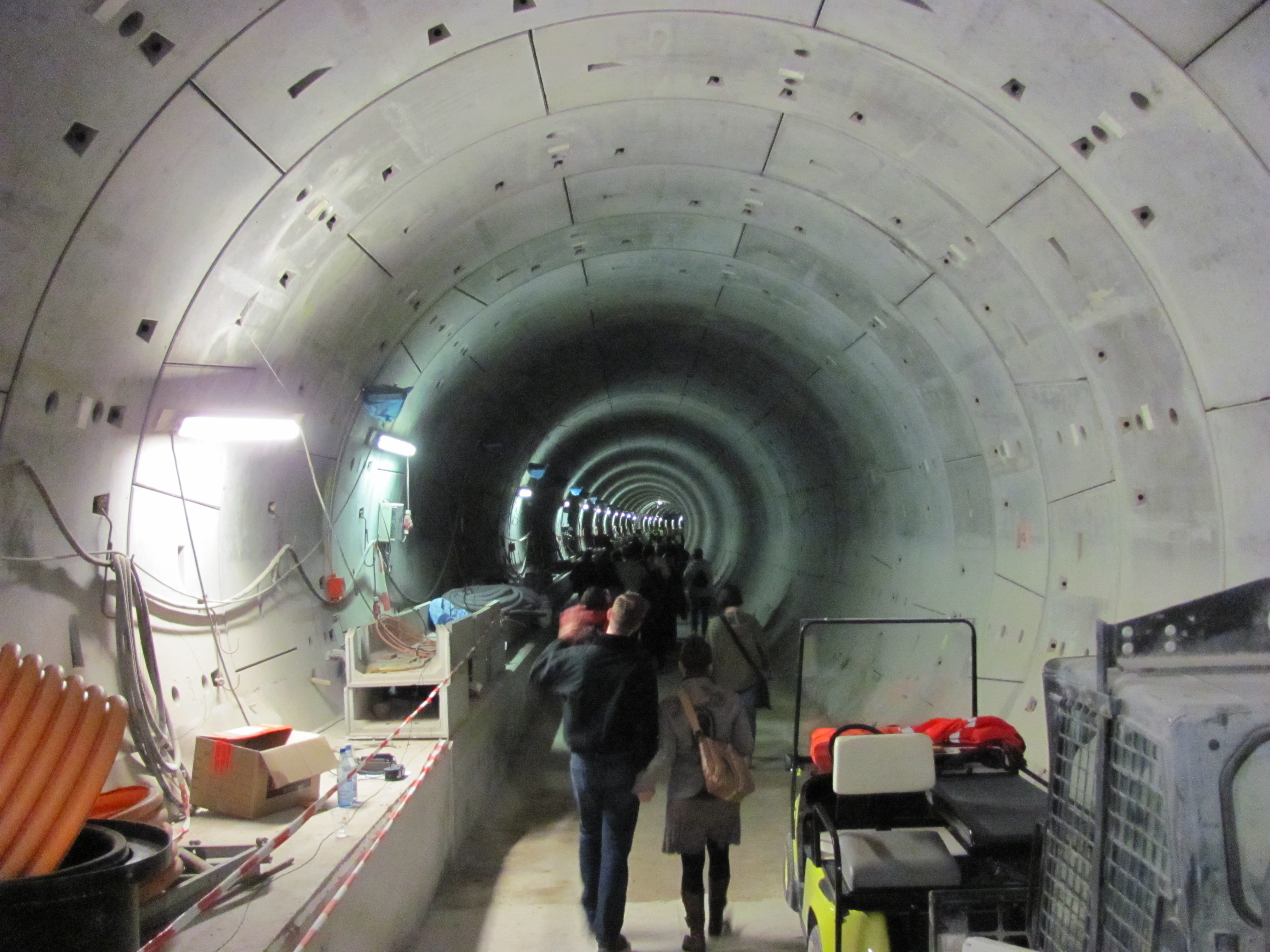 U-Bahnlinie U4 im Bau, Tunneltour am 18. September 2011